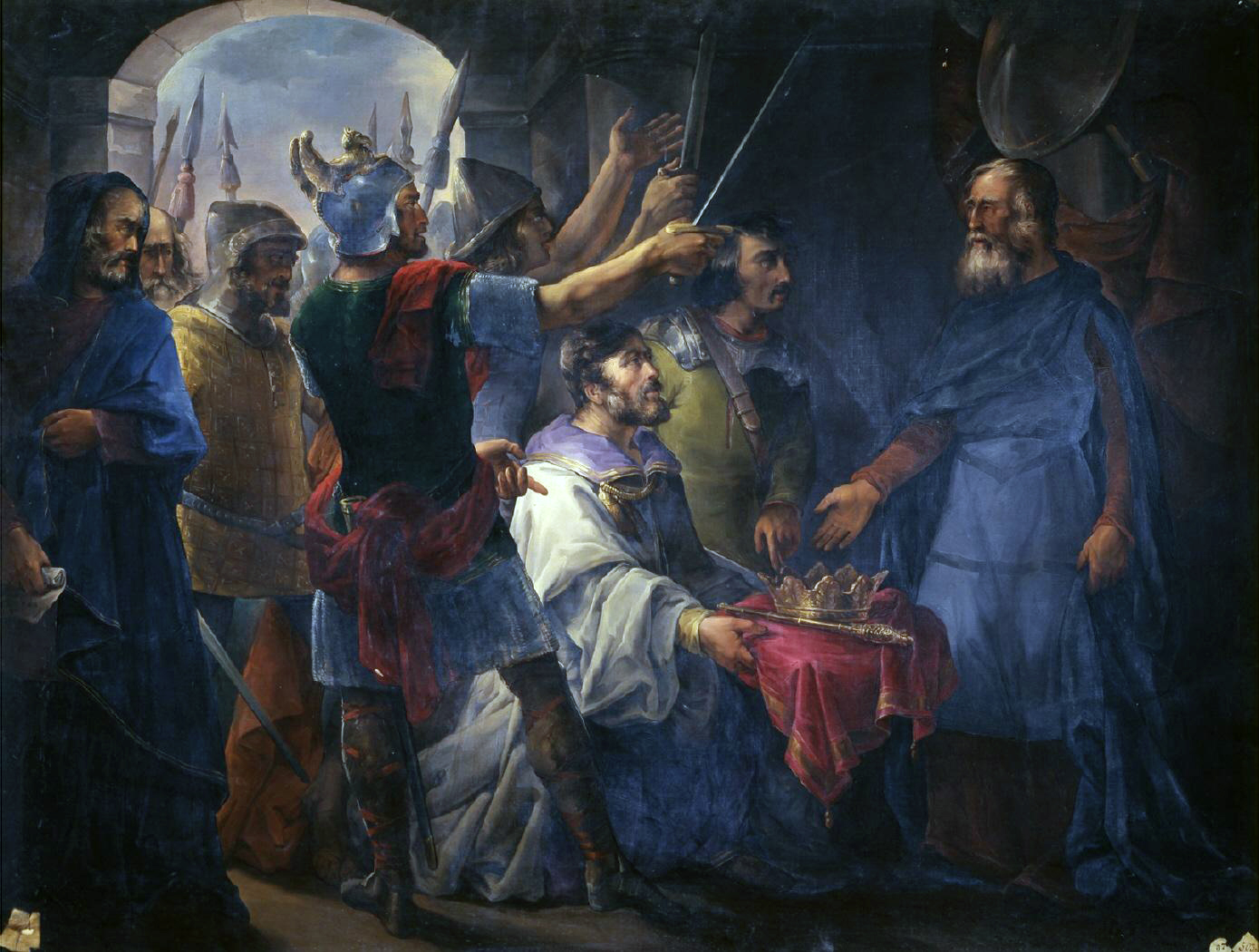 El lienzo representa la elección de Wamba (¿?-688) como rey de los Visigodos. Wamba rechazó el nombramiento debido a su avanzada edad, pero fue forzado por la nobleza a aceptar el trono el día 1 de septiembre del año 672 en la localidad de Gertici o Gérticos, después llamada Wamba en su honor, y en la que había fallecido su antecesor, el rey Recesvinto. Por iniciativa propia, a fin de que su elección no fuera considerada una usurpación, Wamba exigió ser coronado rey en Toledo, donde fue ungido el día 20 de septiembre por el obispo Quirico en la iglesia pretoriense de San Pedro y San Pablo. Wamba renunció al trono en el año 680 y falleció en el año 688. Fue sucedido en el trono por el rey Ervigio.